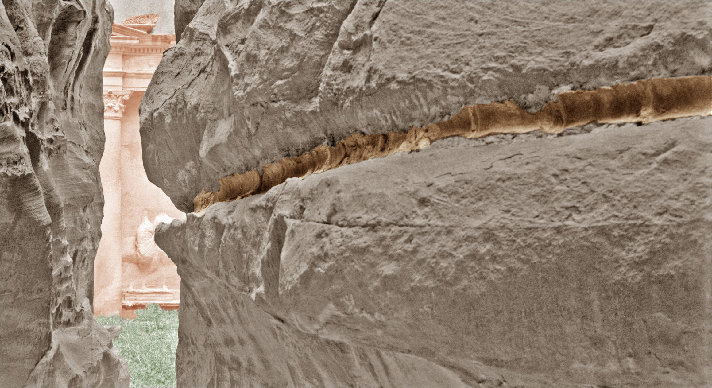 Détails d'une tuyauterie en terre cuite, installée dans une rigole creusée au flan de la montagne..